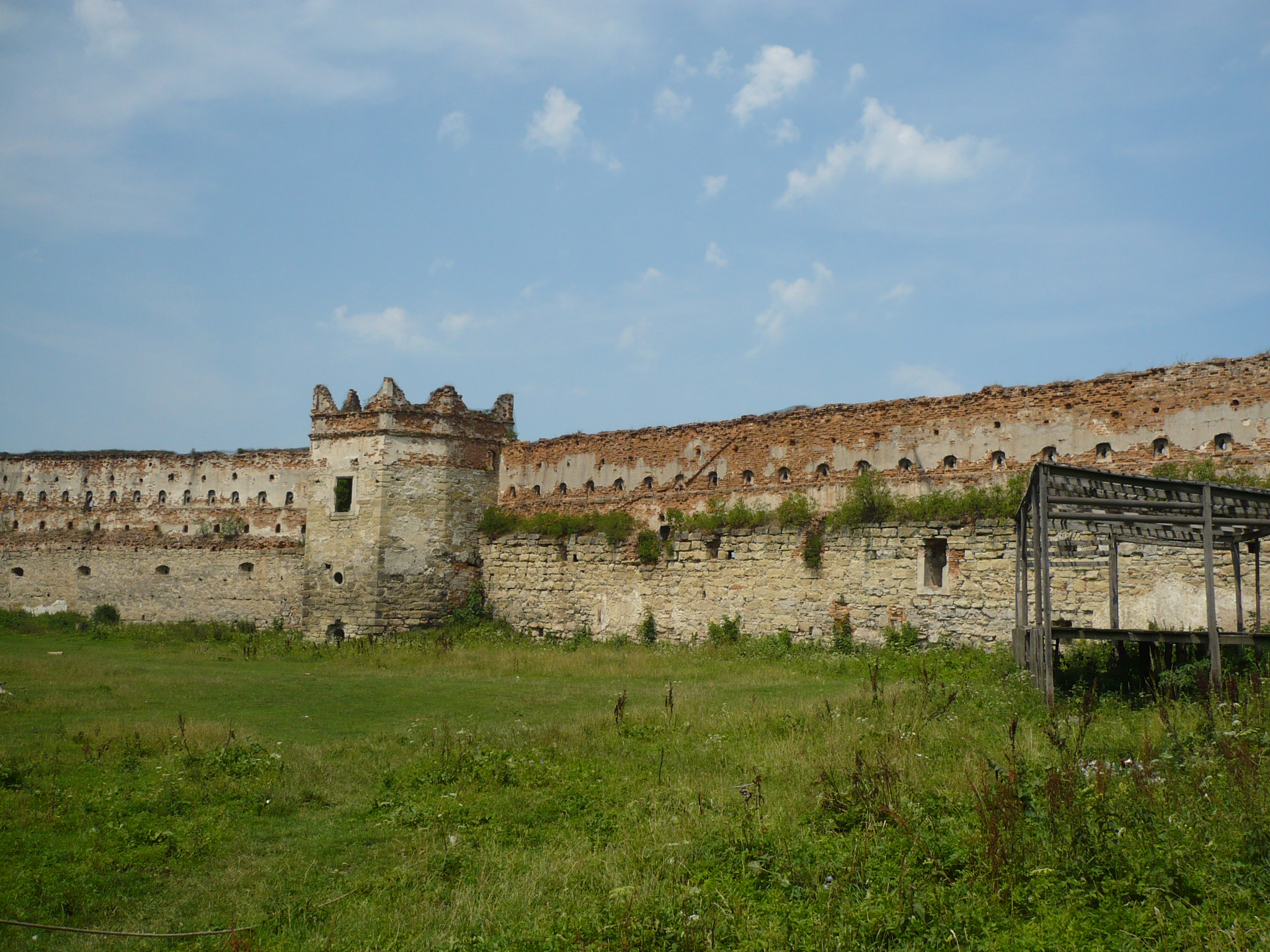 Starym Sioło - zamek księcia Zasławskiego.